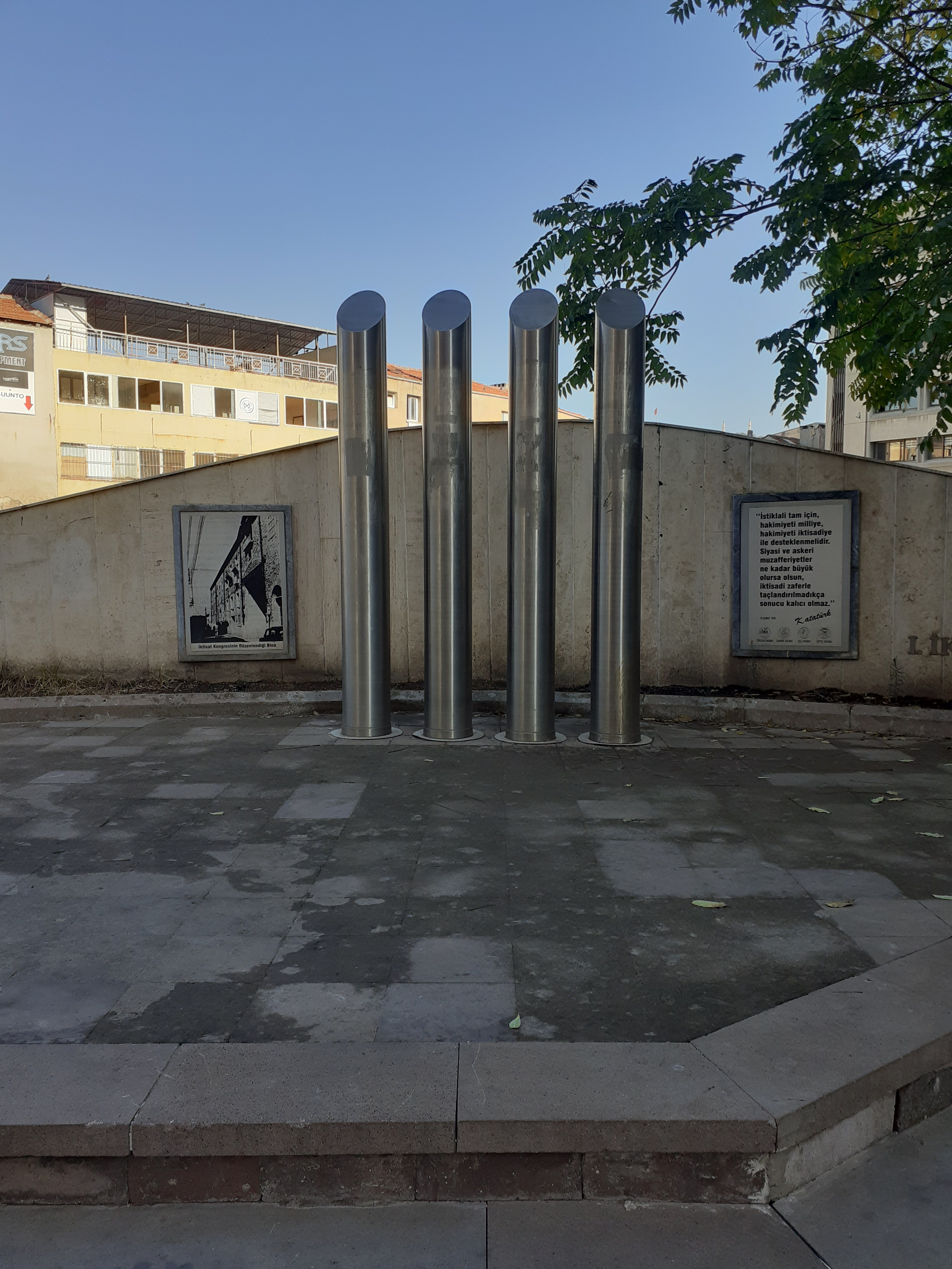 17 Şubat - 4 Mart 1923 tarihlerinde düzenlenen İzmir İktisat Kongresi anısına İzmir Büyükşehir Belediyesi tarafından yaptırılan anıt. Kemeraltı, Gümrük, Çakaloğlu Hanı ve Atatürk Bulvarı'nın kesiştiği köşede bulunmaktadır.